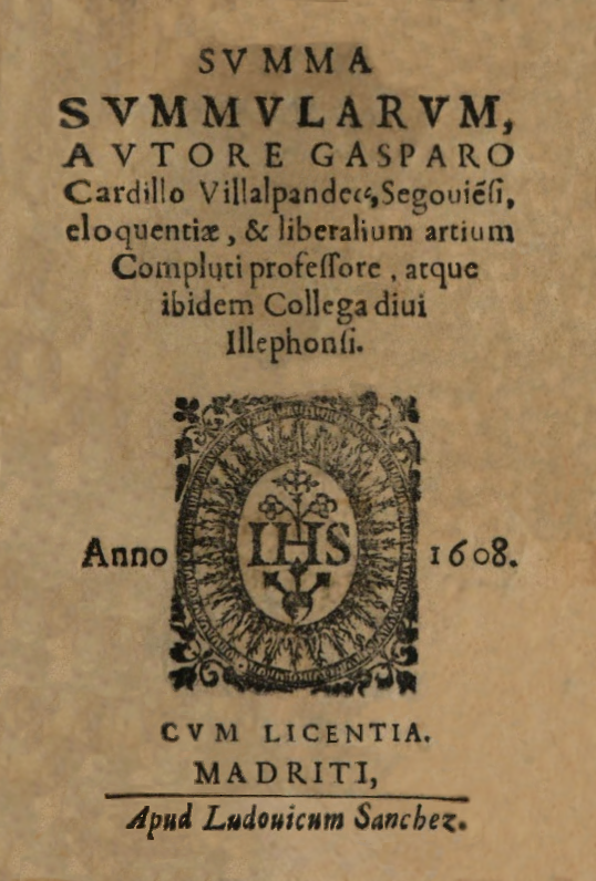 Portada del libro Summa Summularum. Publicado en latín por Gaspar Cardillo de Villalpando en Madrid, en 1608 (10ª edición).